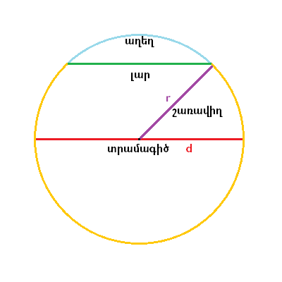 Circle, diameter, radius, chord